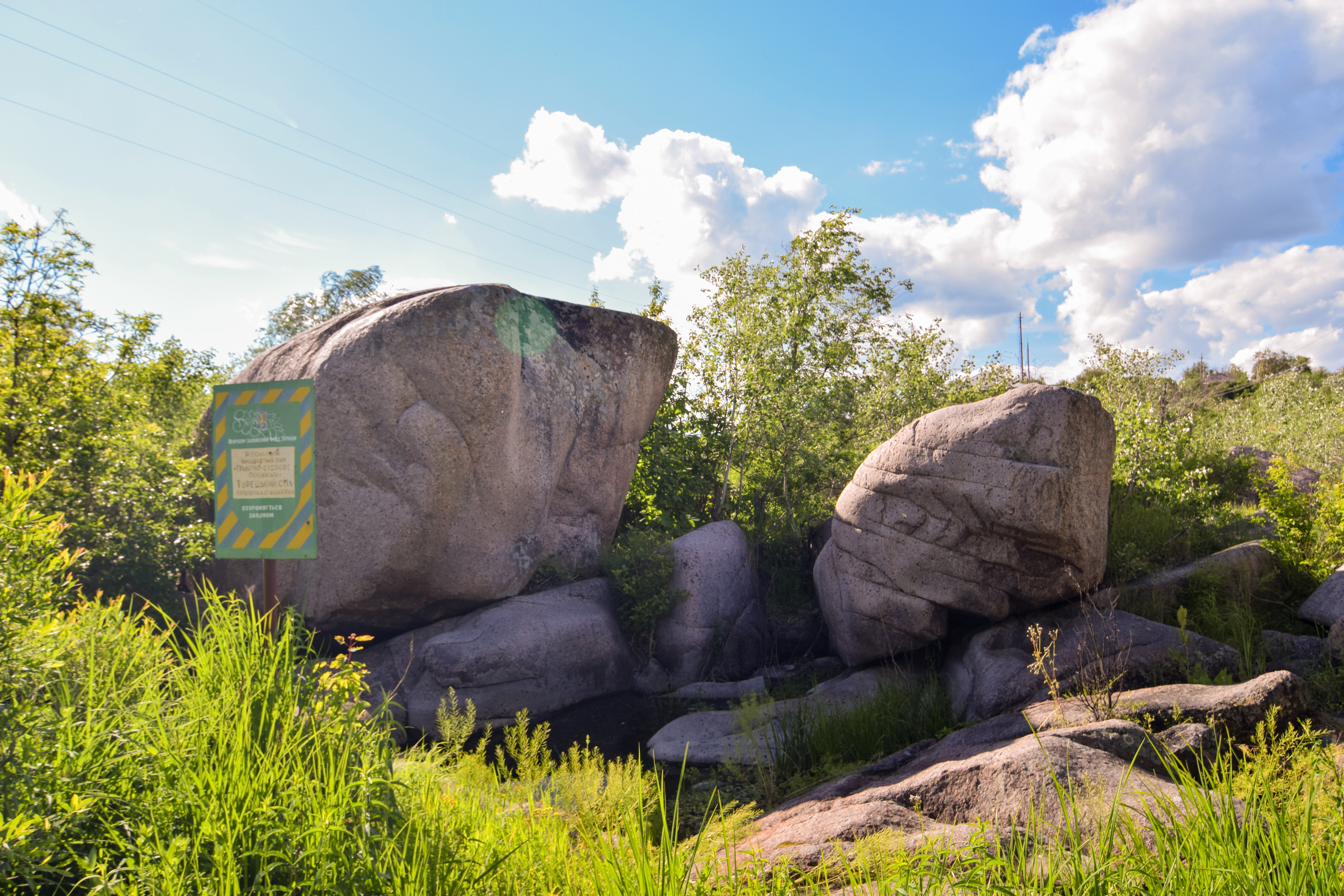 Турецький стіл, Первомайський р-н, с. Мигія